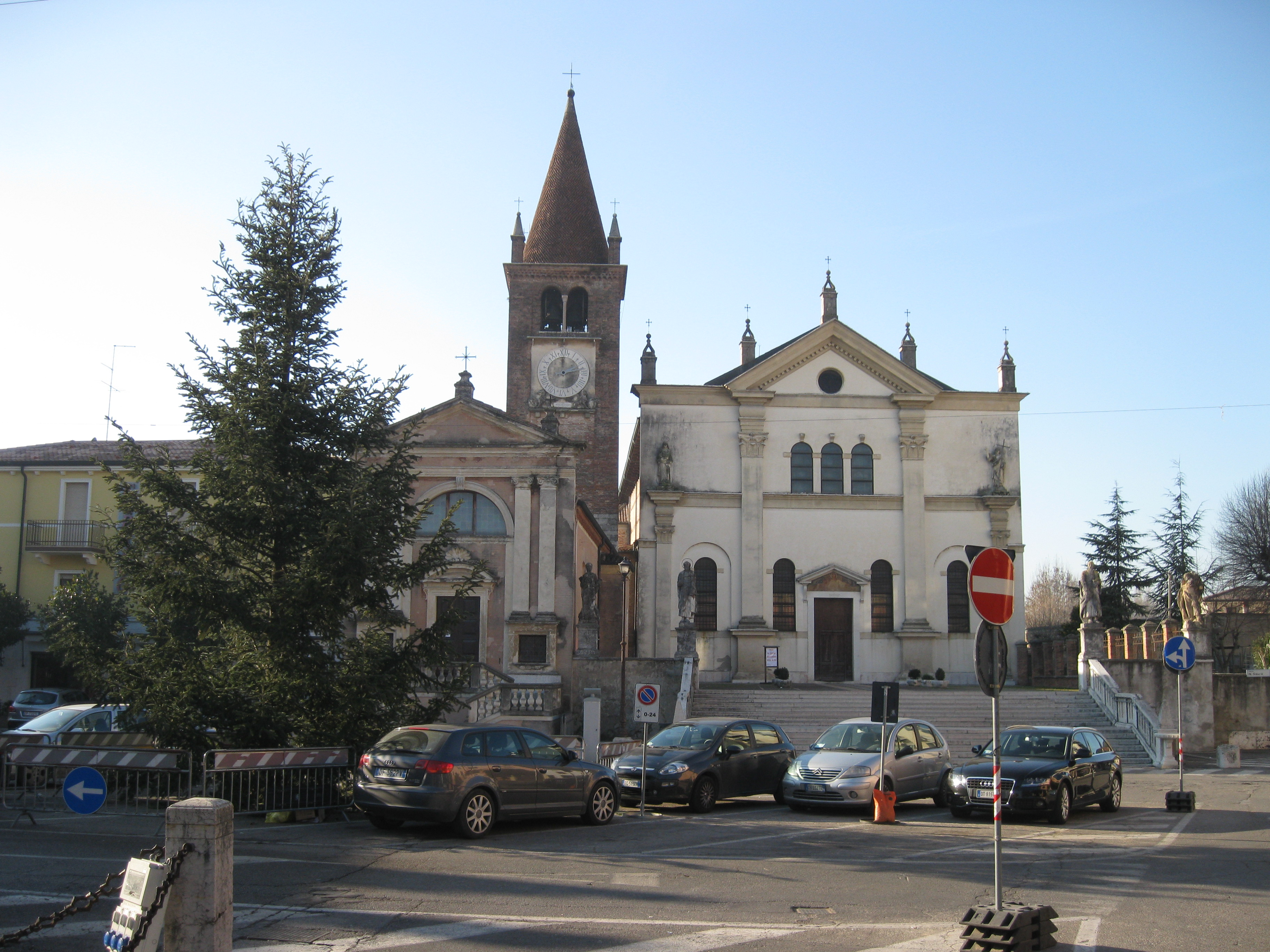 Abbazia di Isola della Scala, Italien